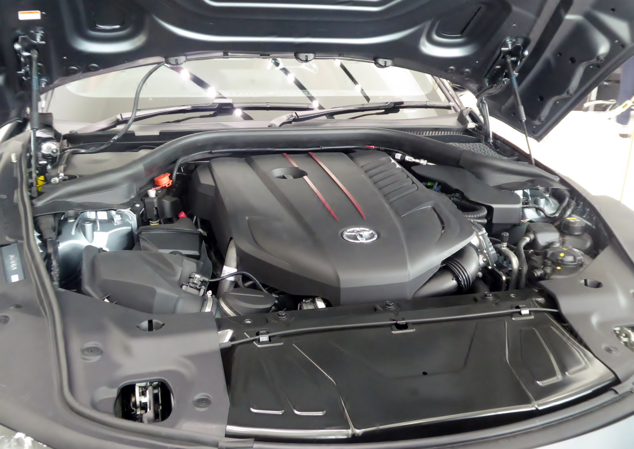 3BA-DB42-ZRRW型トヨタ・GRスープラRZのエンジンルームを撮影。